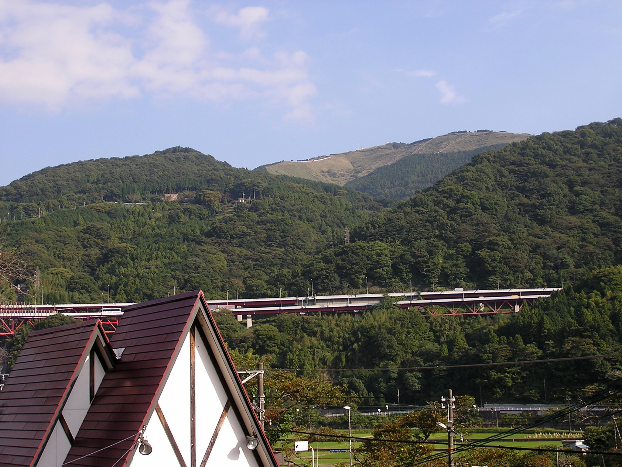 谷峨駅裏手より望む、大野山